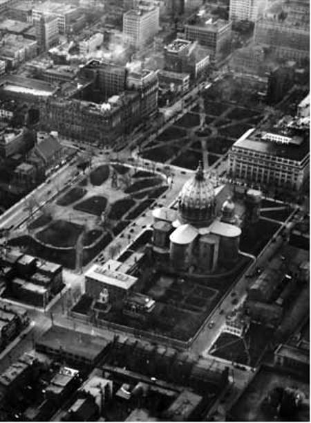 Photo de perspective (1927) du Square Dominion. Plan historique, Détail de l’atlas Pinsonneault, Archives nationales du Canada, Ottawa, NMC-16305